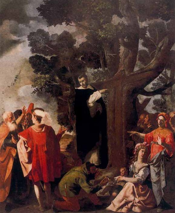 Milagro del árbol de S. Luis Beltrán, de Jerónimo Jacinto de Espinosa. S. XVII